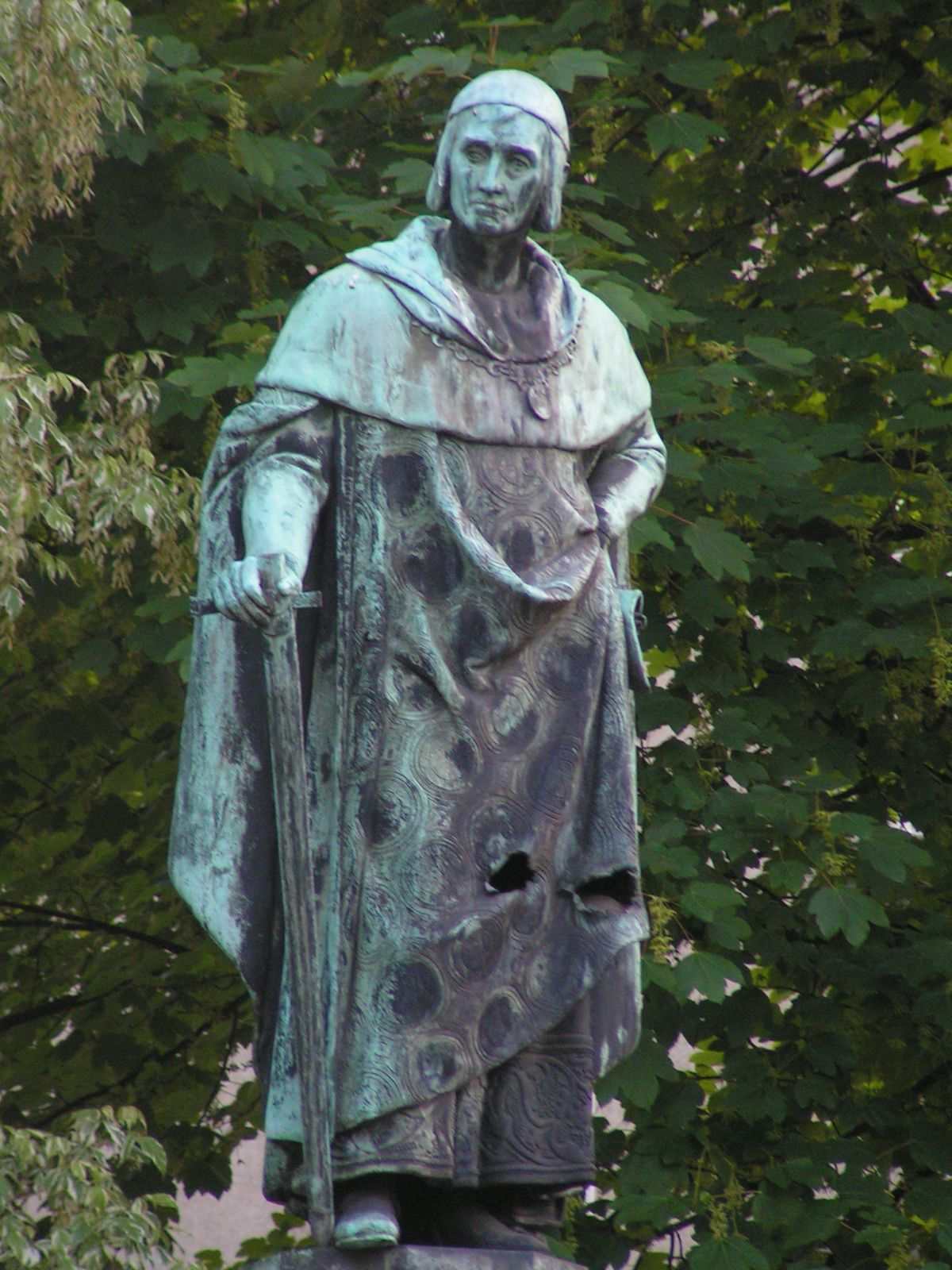 Balduin von Luxemburg selbstfotografiert (Mai 2004) GNU-FDL